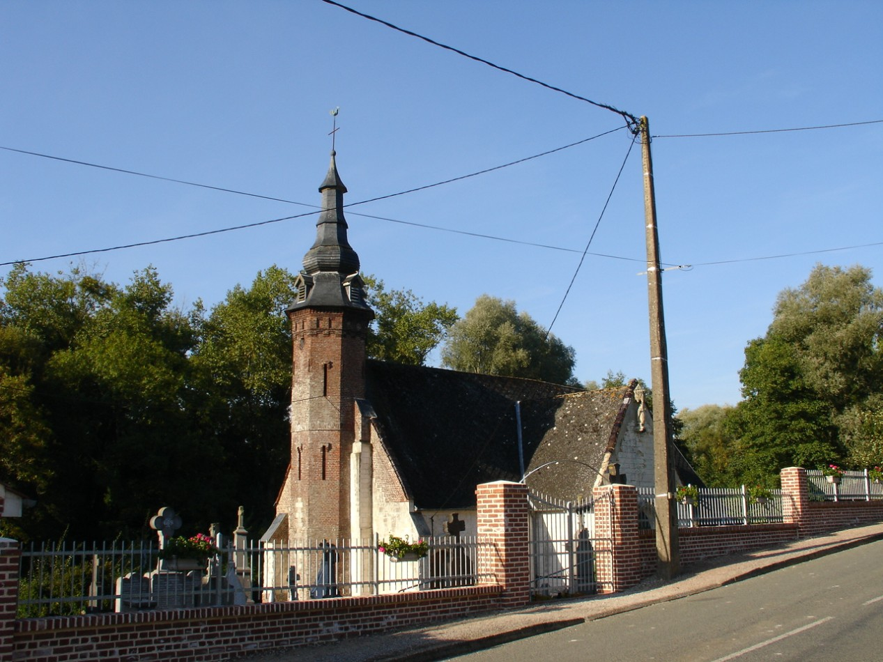 Église de Torcy